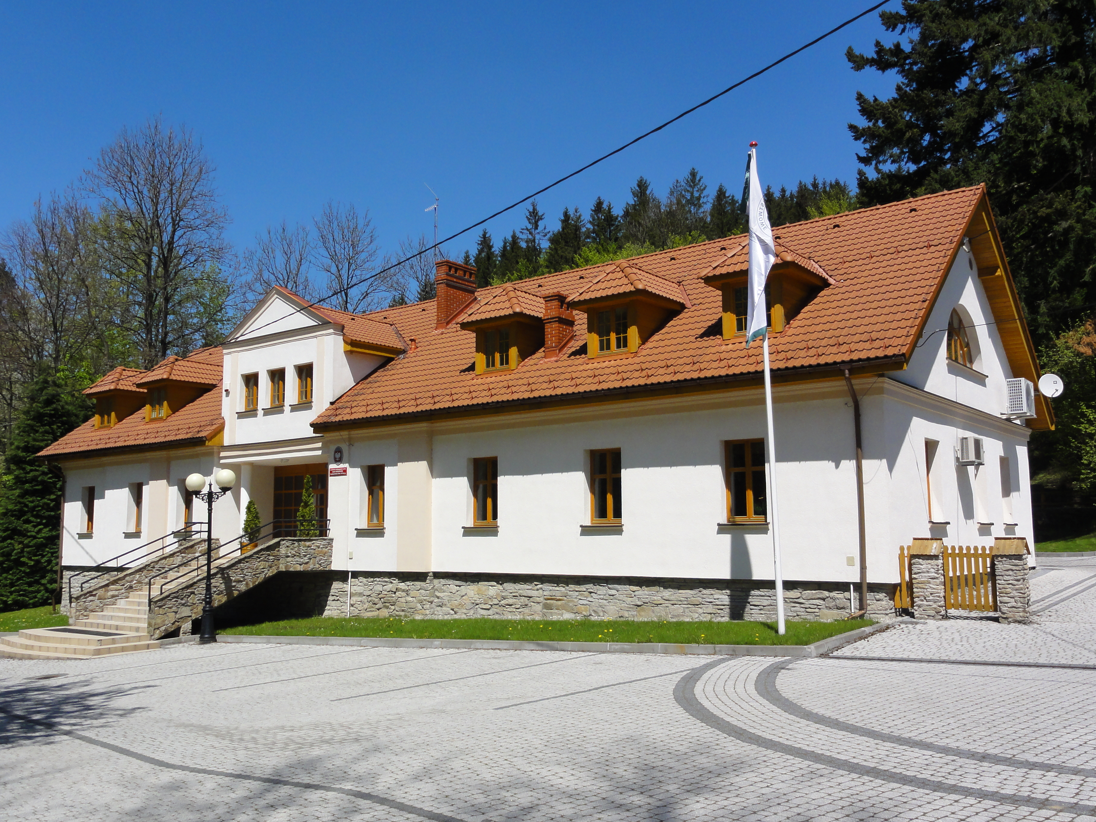 Państwowe Gospodarstwo Leśne Lasy Państwowe Nadleśnictwo Wisła